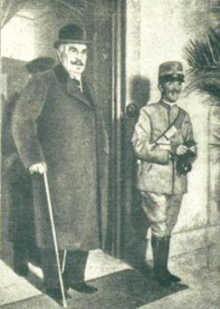 Nicholas I of Montenegro and Victor Emmanuel III of Italy in France